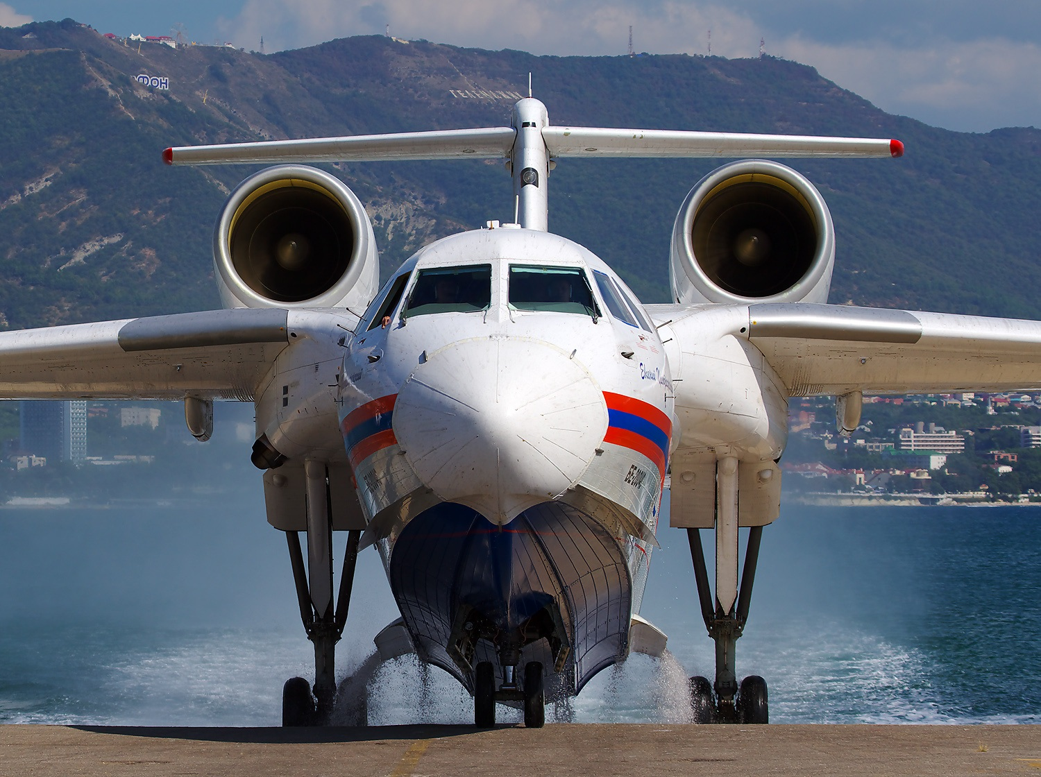 RF-32768 (cn 76820002602)